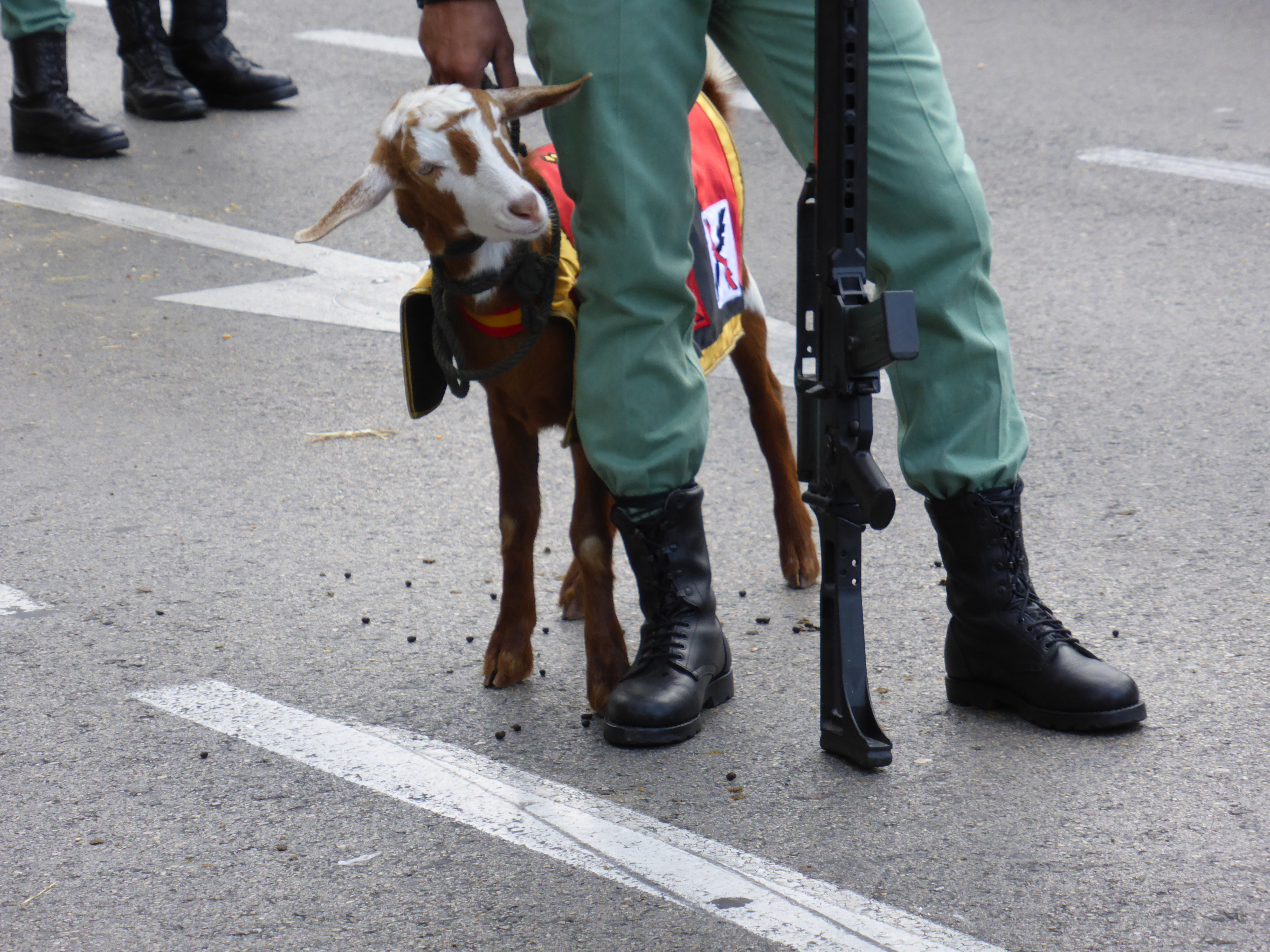 La tradicional cabra de la Legión, esperando para desfilar el día de la Fiesta Nacional de España, en Madrid. La cabra del año 2015 es hembra, de un año. Desfiló sin ataduras, a toda velocidad, igual que los legionarios.